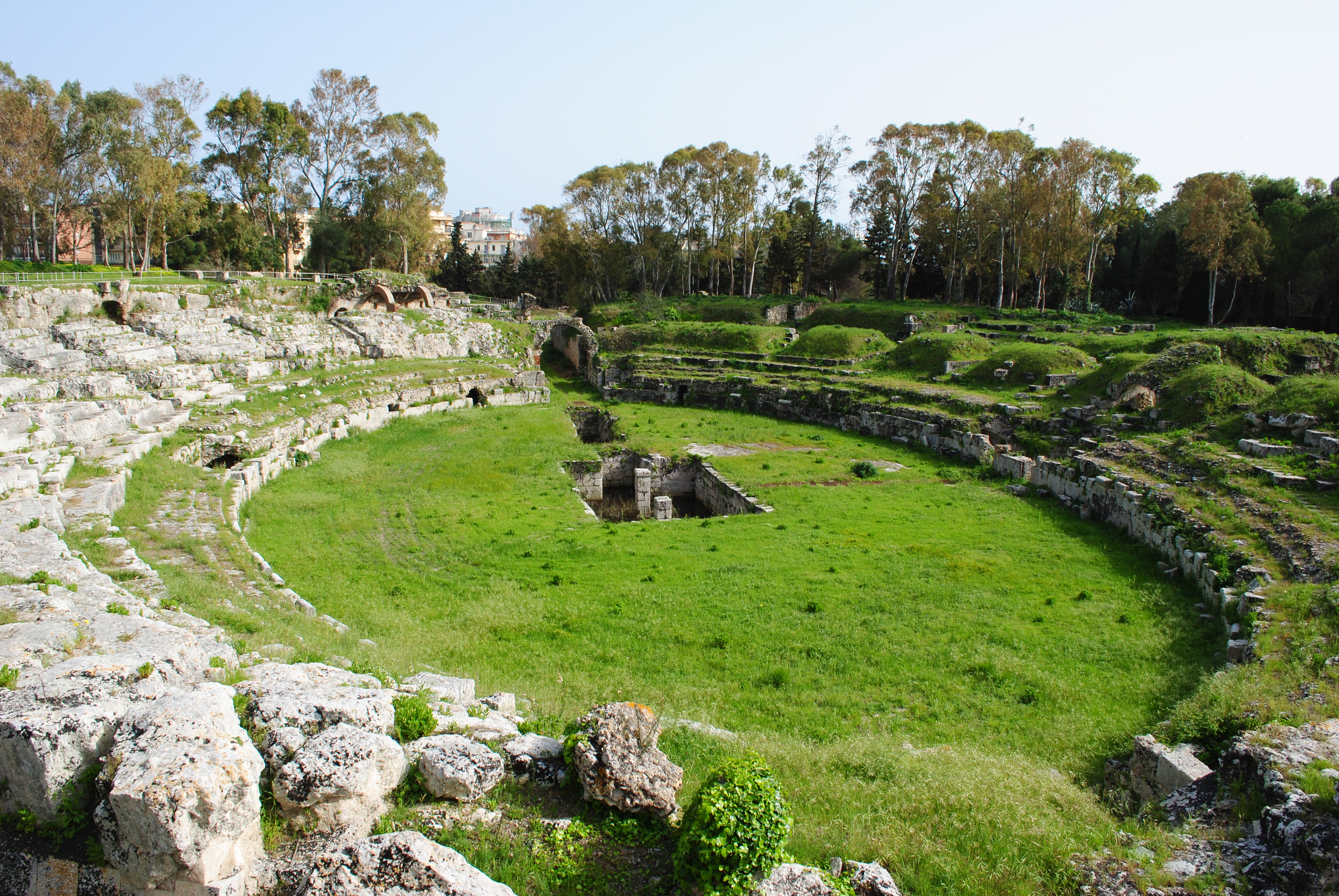 Coliseu Romà